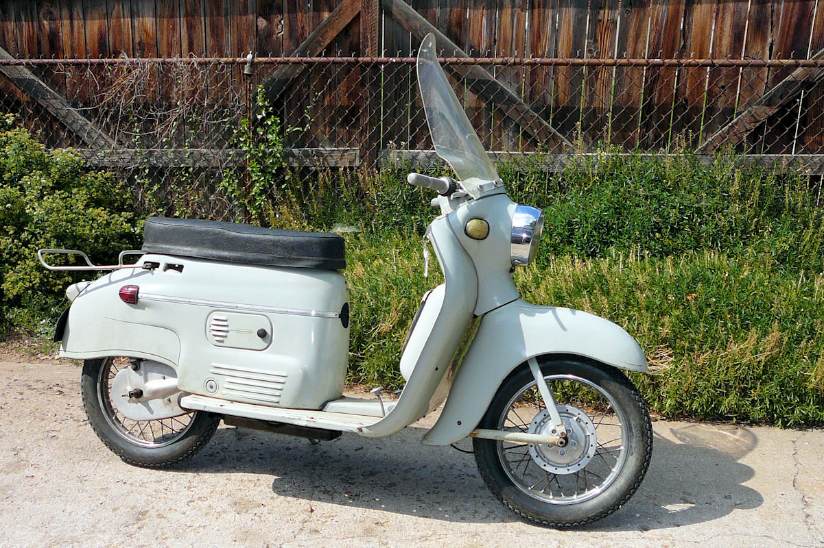 1960 Jawa Manet.